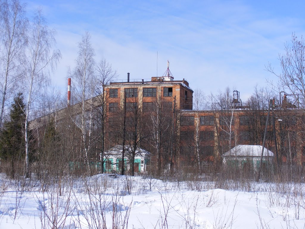 Фабрика ОПОФ Жилёво